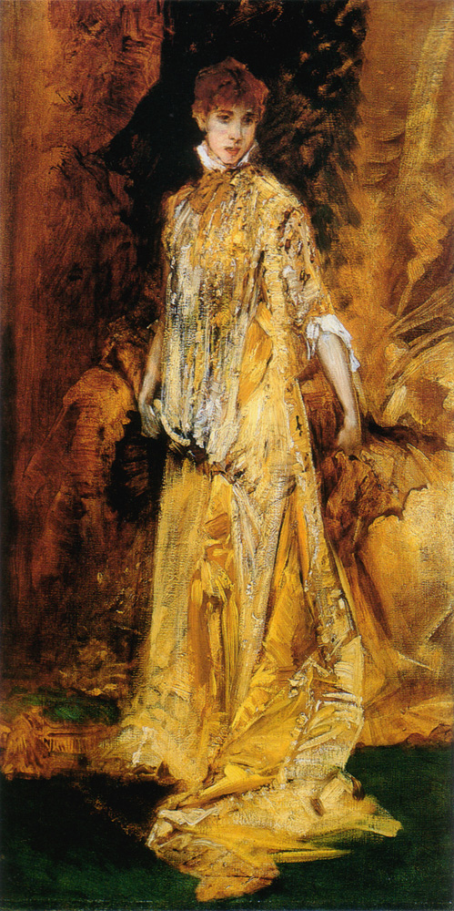 Sarah Bernhardt